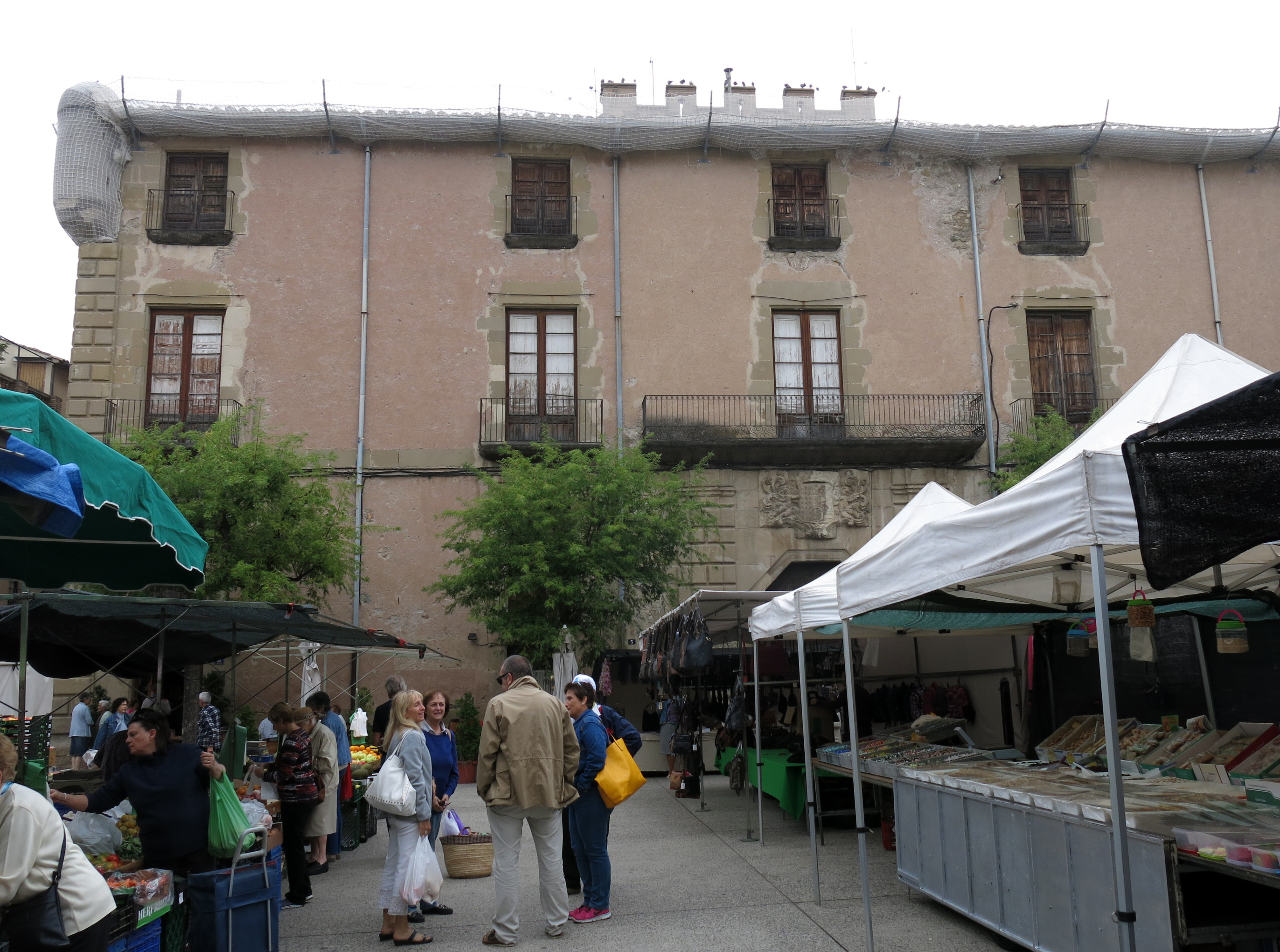 Palau Comtal de Centelles, pl. Major, en dia de mercat